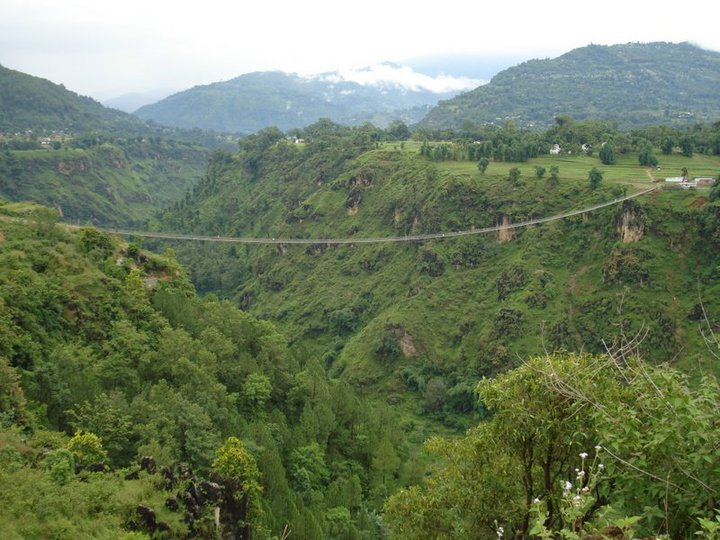 नेपाली: पर्वत को कुश्मासँग अन्य भागलाई जोड्ने पुल ।